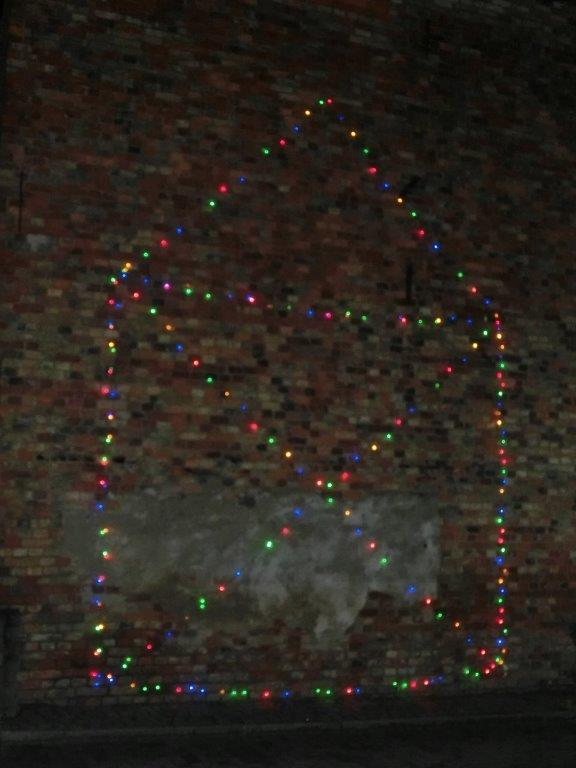 Lichterkette nach Art des Hauses vom Nikolaus an der Außenwand einer Scheune in Plau am See. Idee von Martin Wiegert, Montage von Hans Jürgen Schröder.